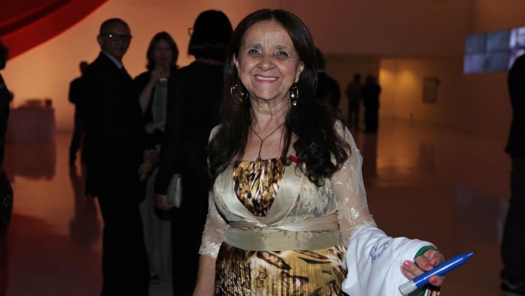 São Paulo (SP) | Ministério da Cultura celebra a Ordem do Mérito Cultural 2013. Na foto: Rosa Maria dos Santos Alves. 05.11.2013 Foto: Montserrat Bevilaqua